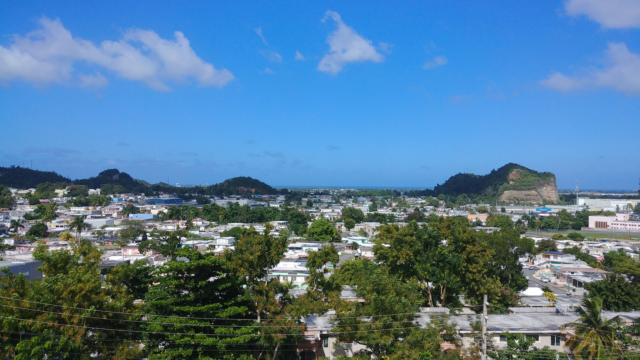 Barrio Hato Tejas, Bayamón, Puerto Rico (2019)